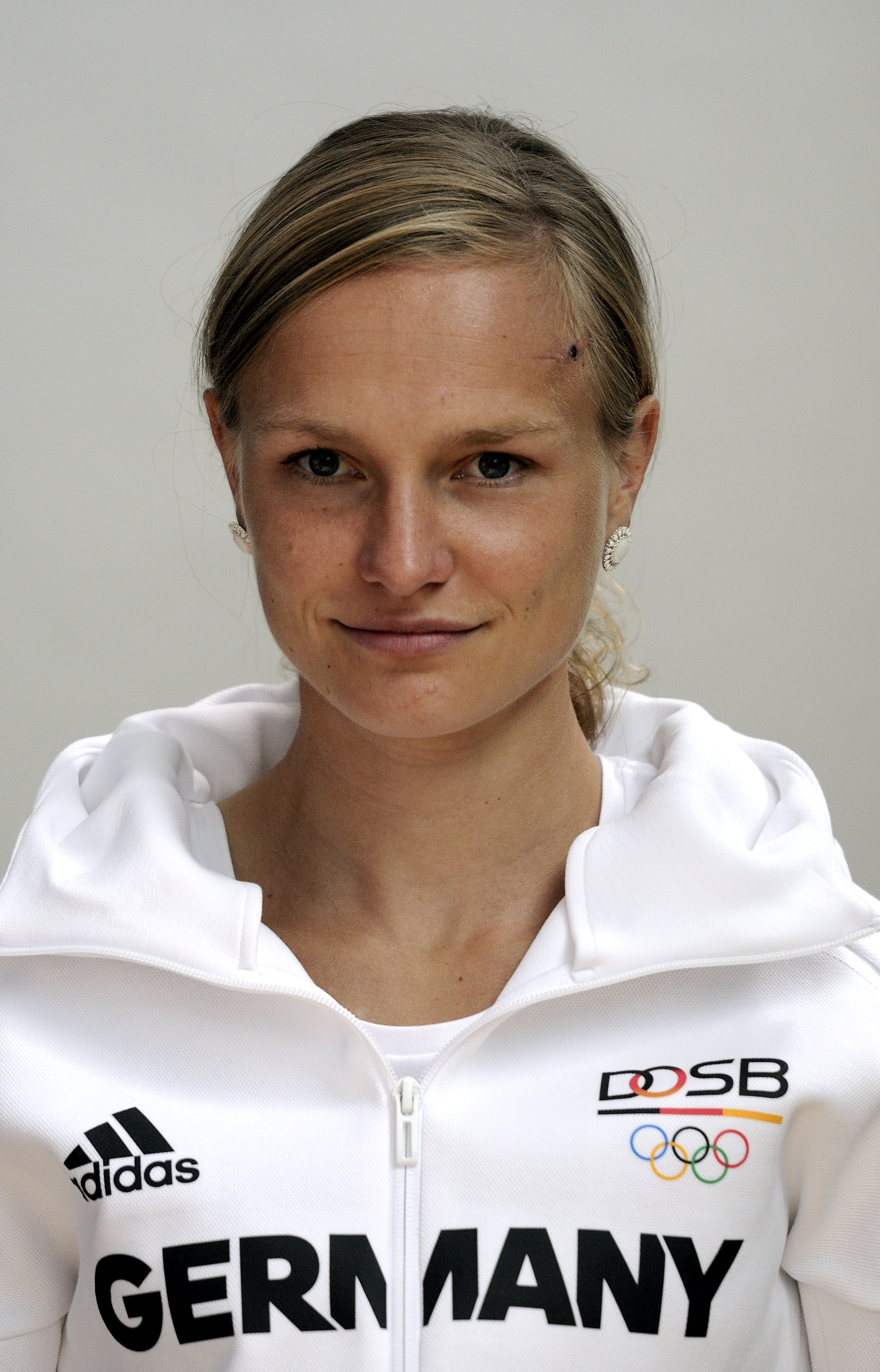 Bild aufgenommen in Hannover während der Einkleidung der deutschen Olympiamannschaft 2016. Anna Hahner.